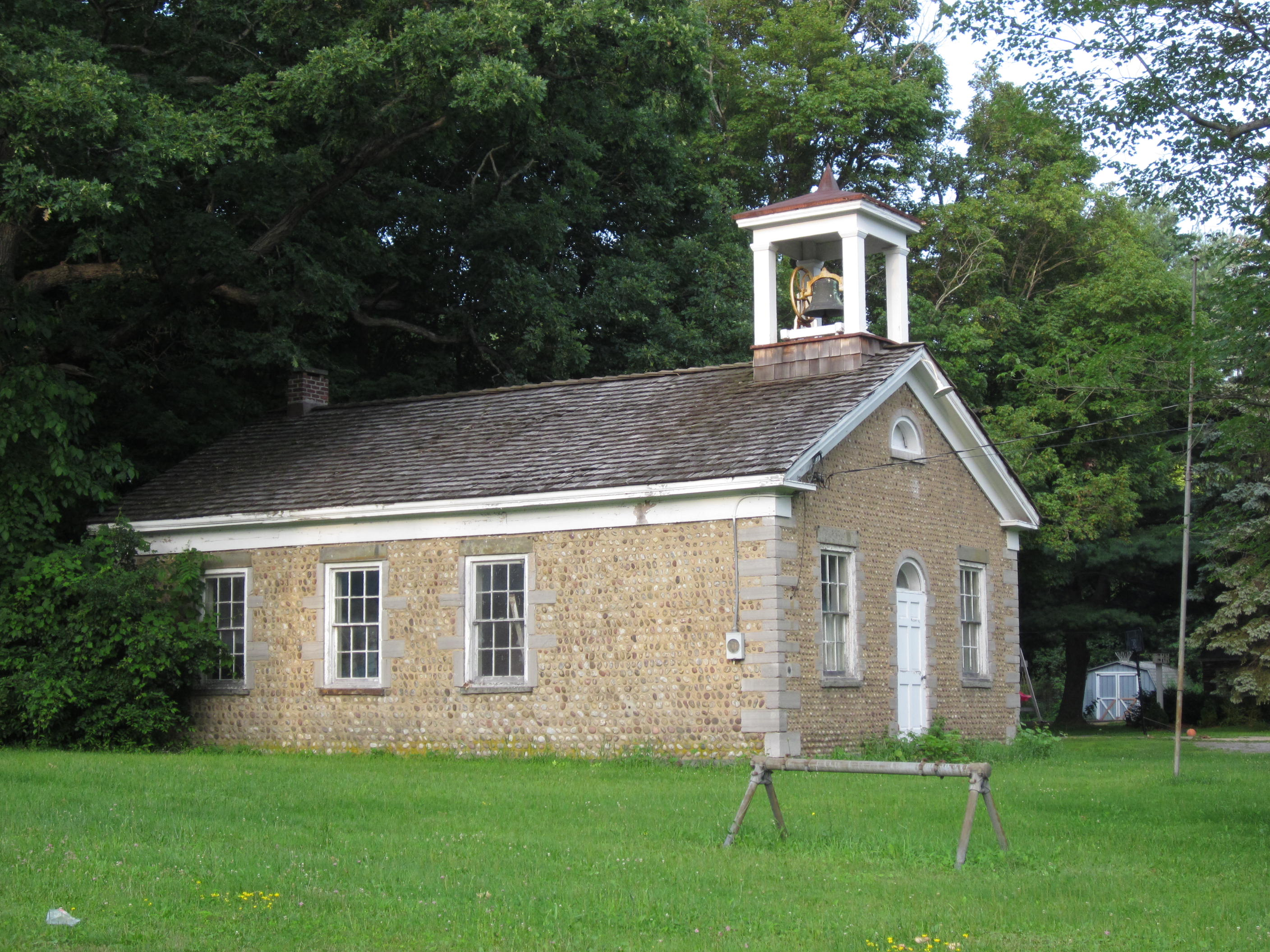 Guilderland Center, New York